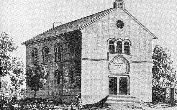 Ehemalige Synagoge in Heidenheim (Mittelfranken)